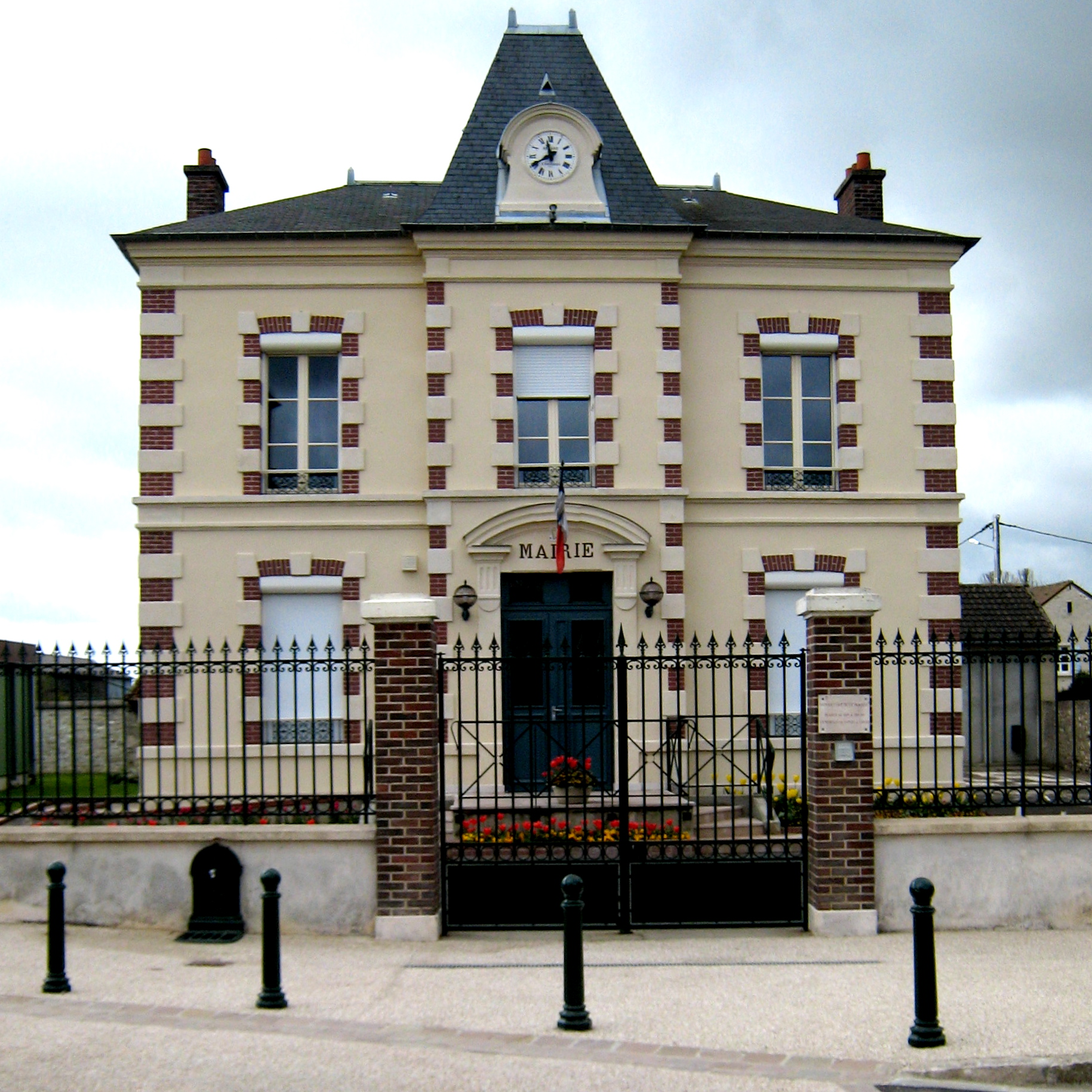 Mairie de Boinville en Mantois, Yvelines, France